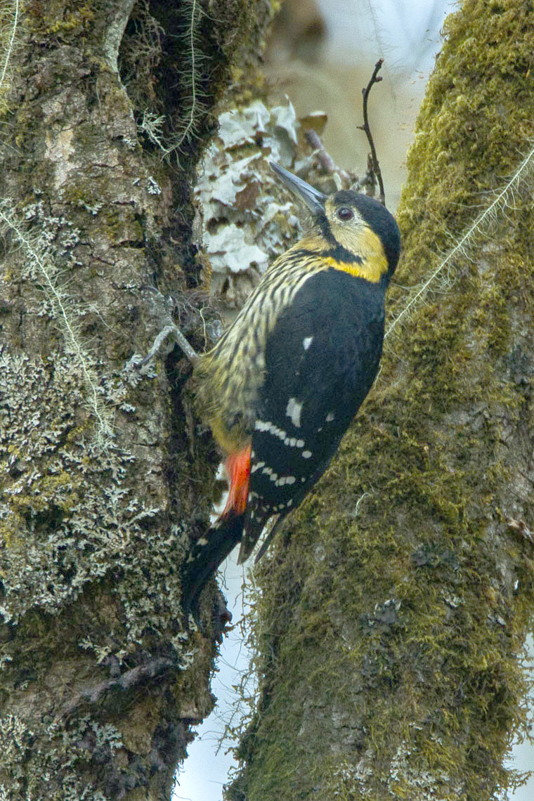 Darjeeling Woodpecker - Bhutan _S4E9850